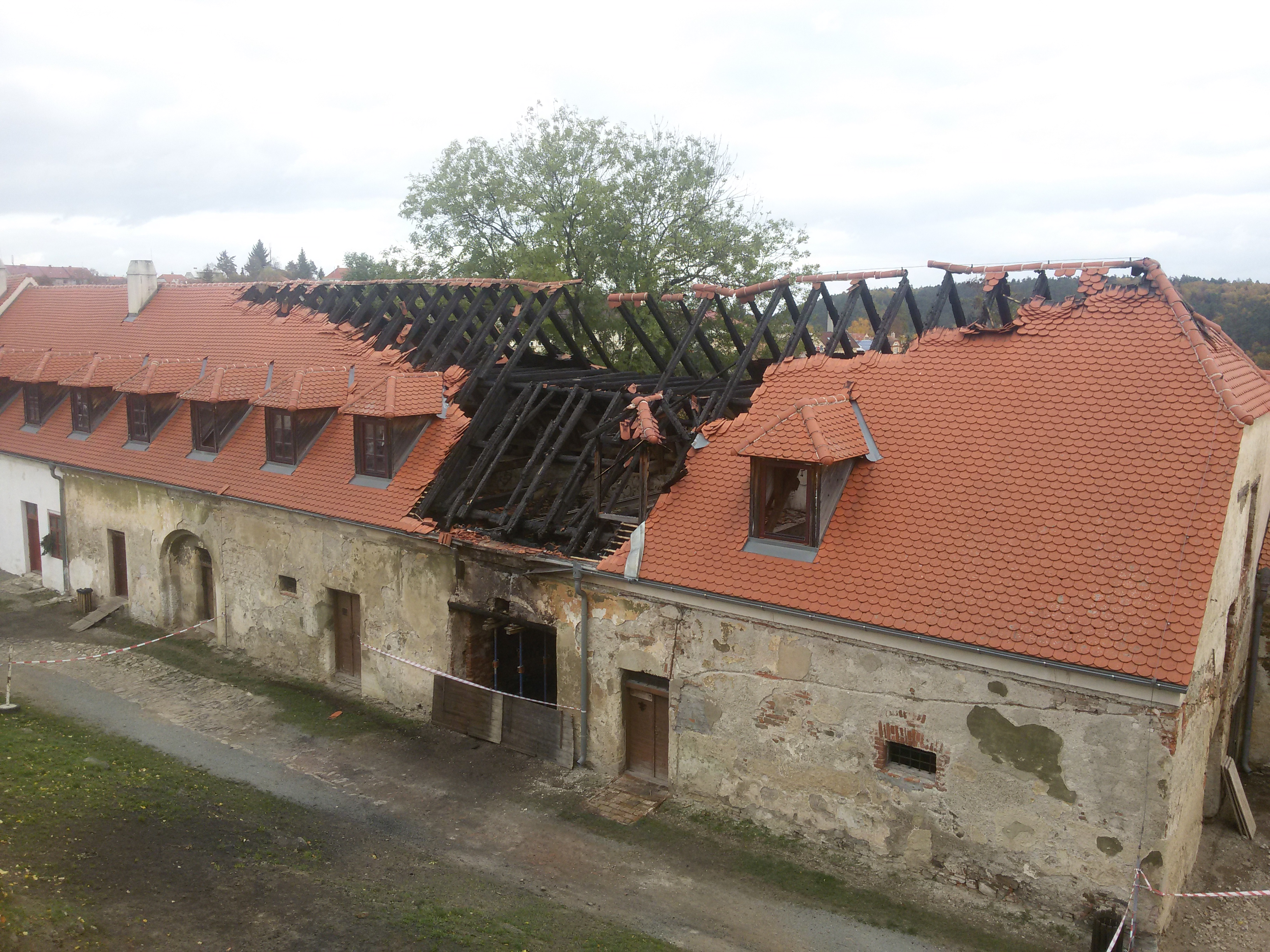 Křídlo zamku Plumlov po požáru 2016